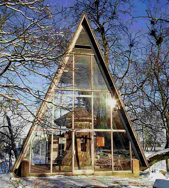 Музей Баўбляй